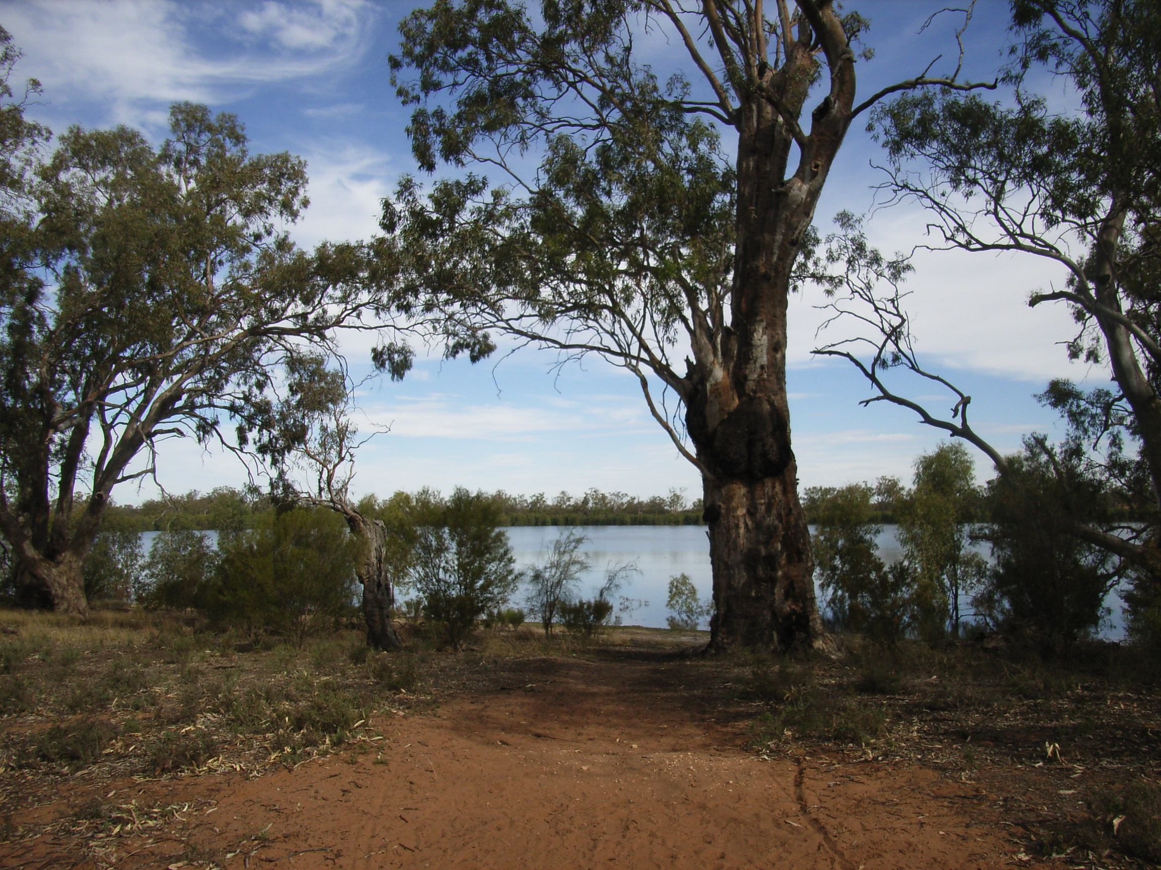 HATTAH LAKE HATTAH-KULKYNE